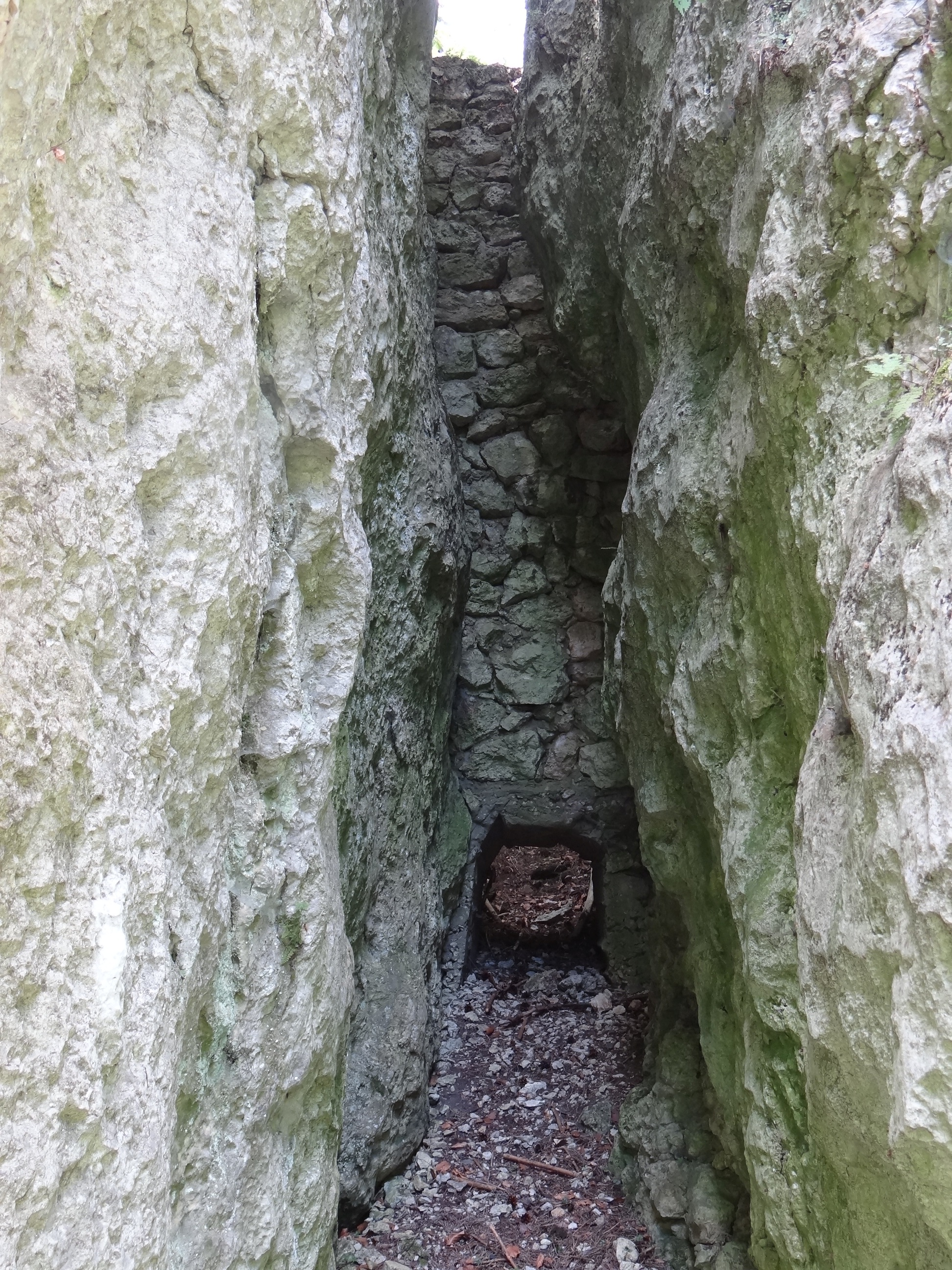 Dawny wapiennik w Pomorzańskich Skałach